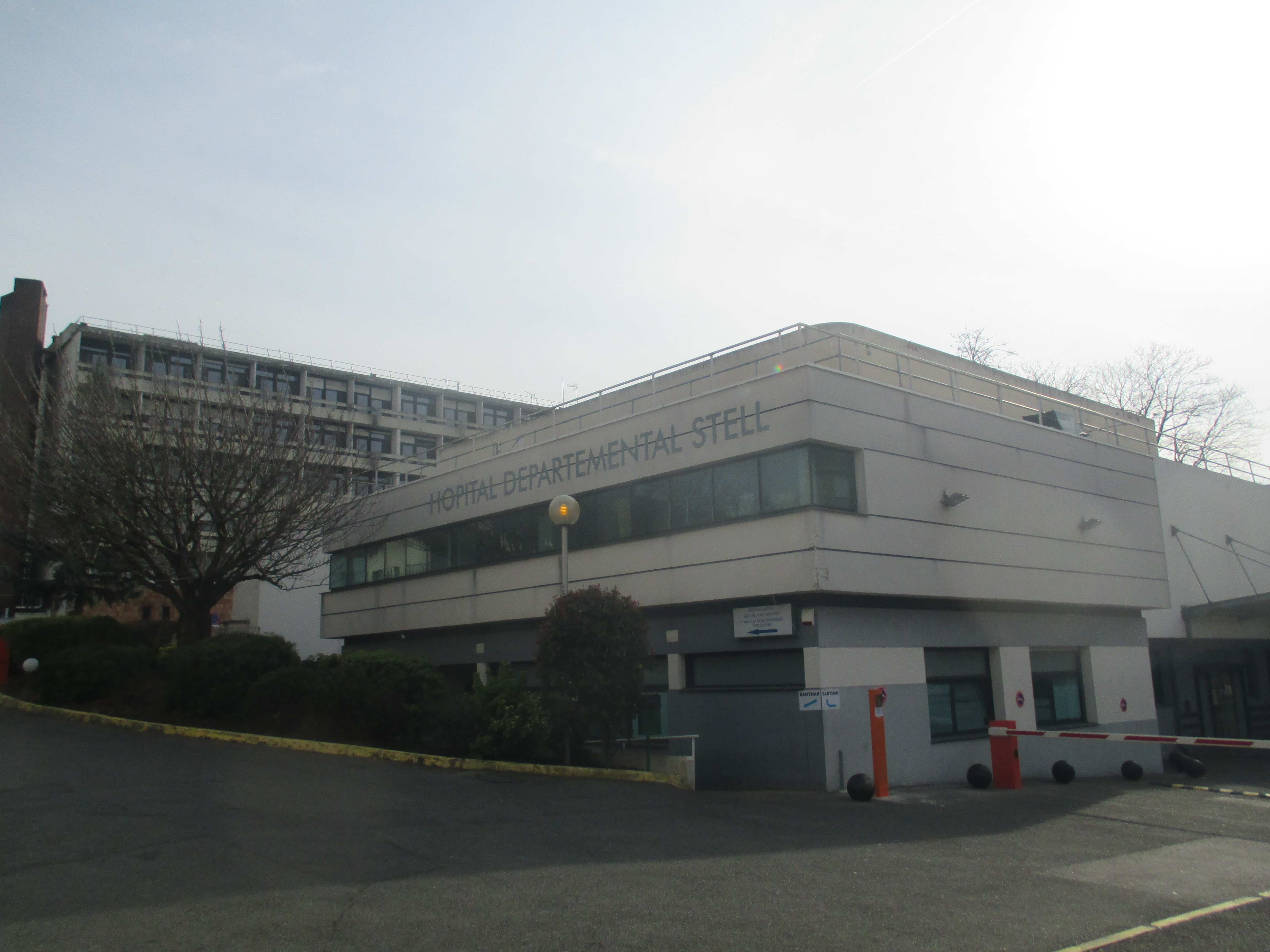 Hôpital Stell à Rueil-Malmaison